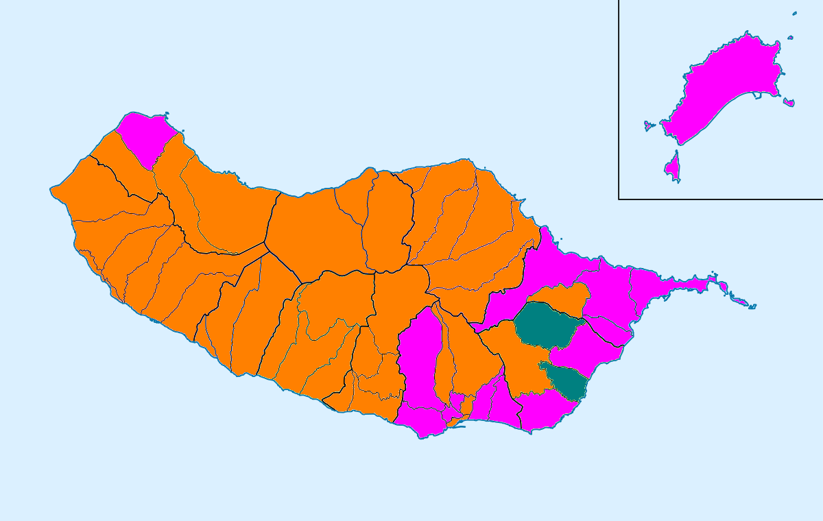 Mapa ilustrativo